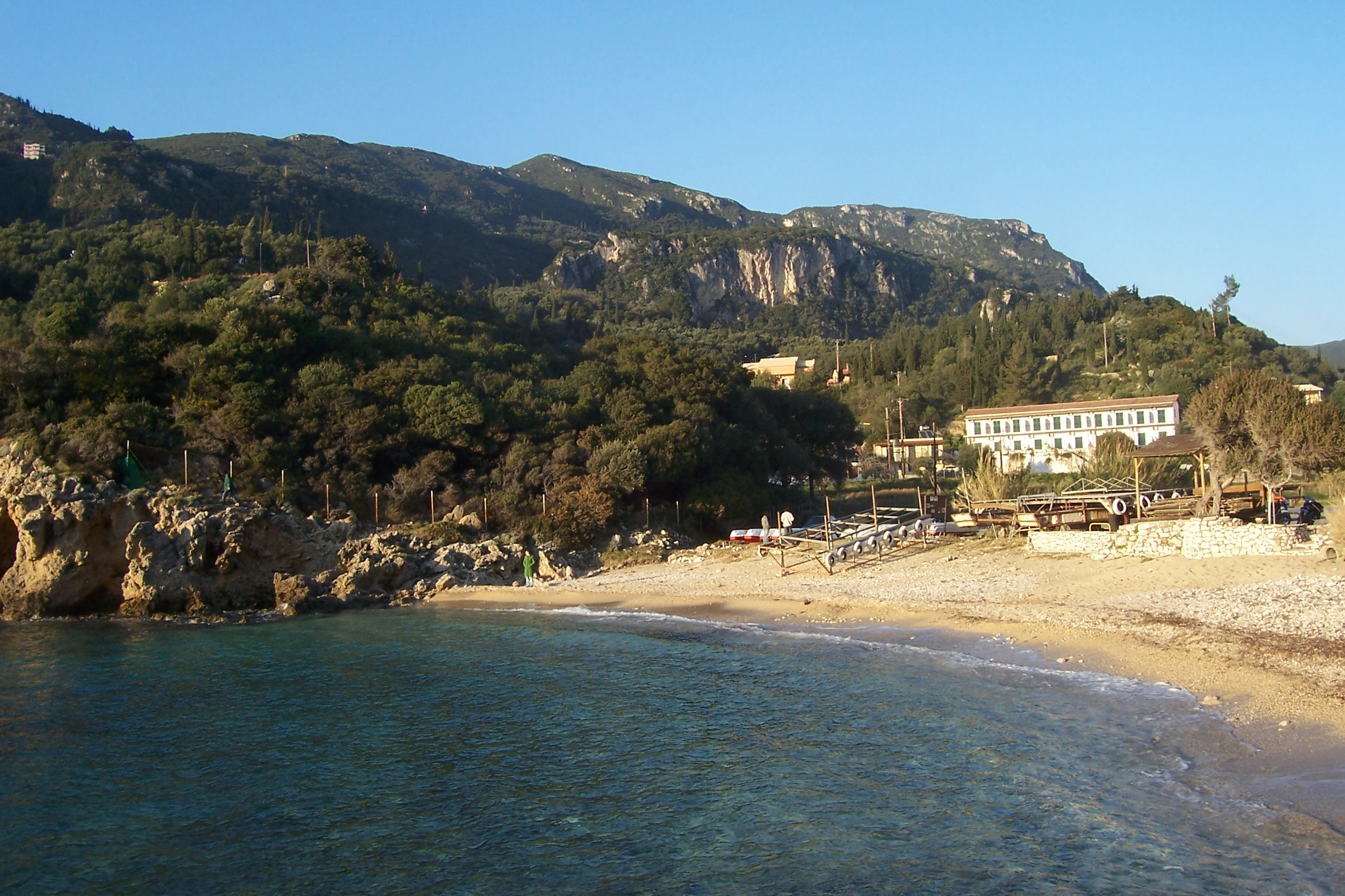 Παραλία της Παλαιοκαστρίτσας.